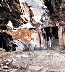 Immagine della Cava di Fossa Combratta sul Monte Brugiana